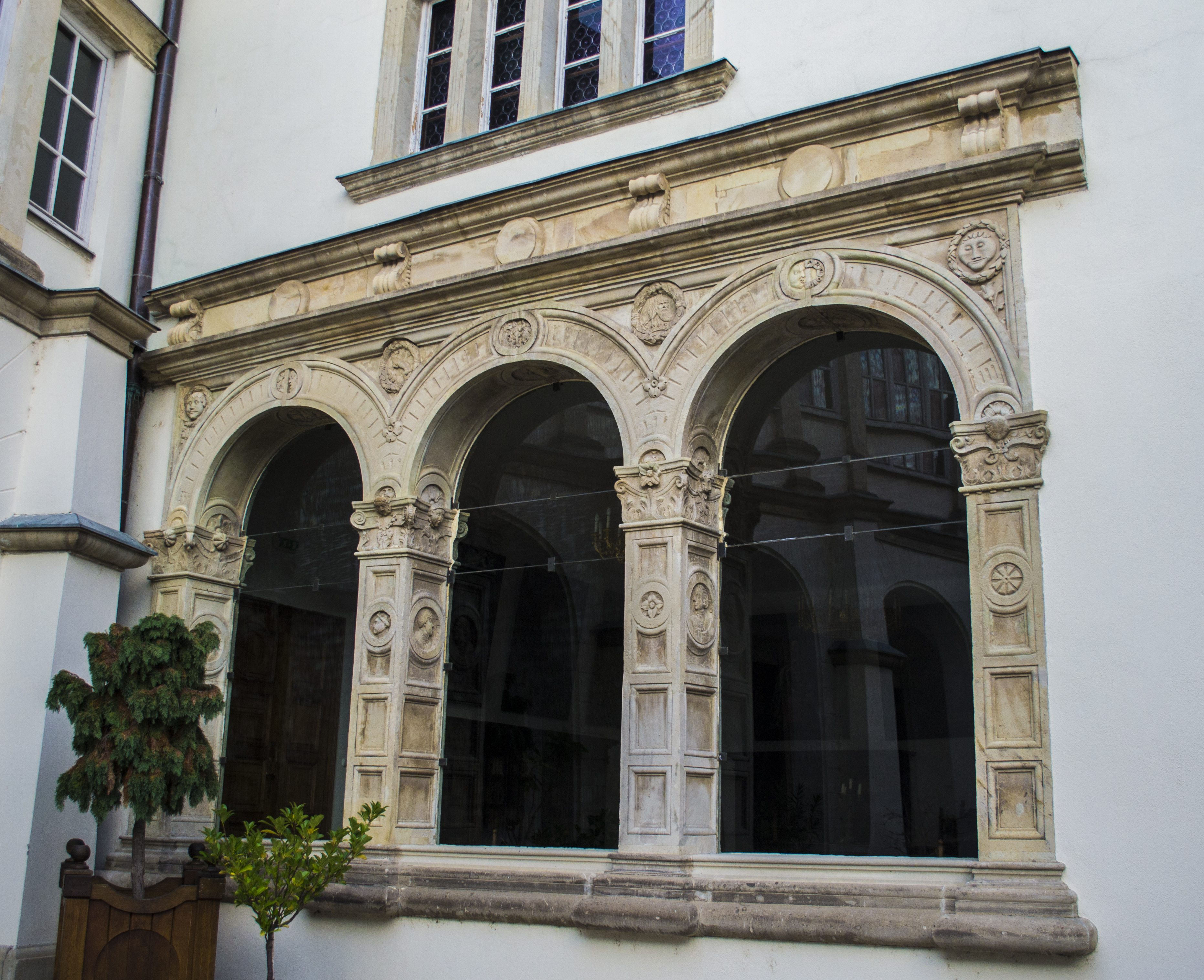 Ablak a Rákóczi várkastély belső udvarán, Sárospatak This is a photo of a monument in Hungary. Identifier: 18069